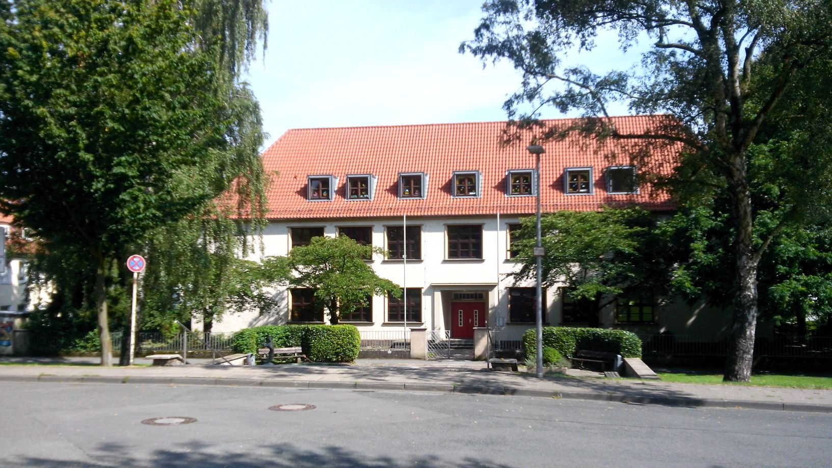 Schulgebäude der denkmalgeschützten Wohnsiedlung Wellensiek in Bielefeld.